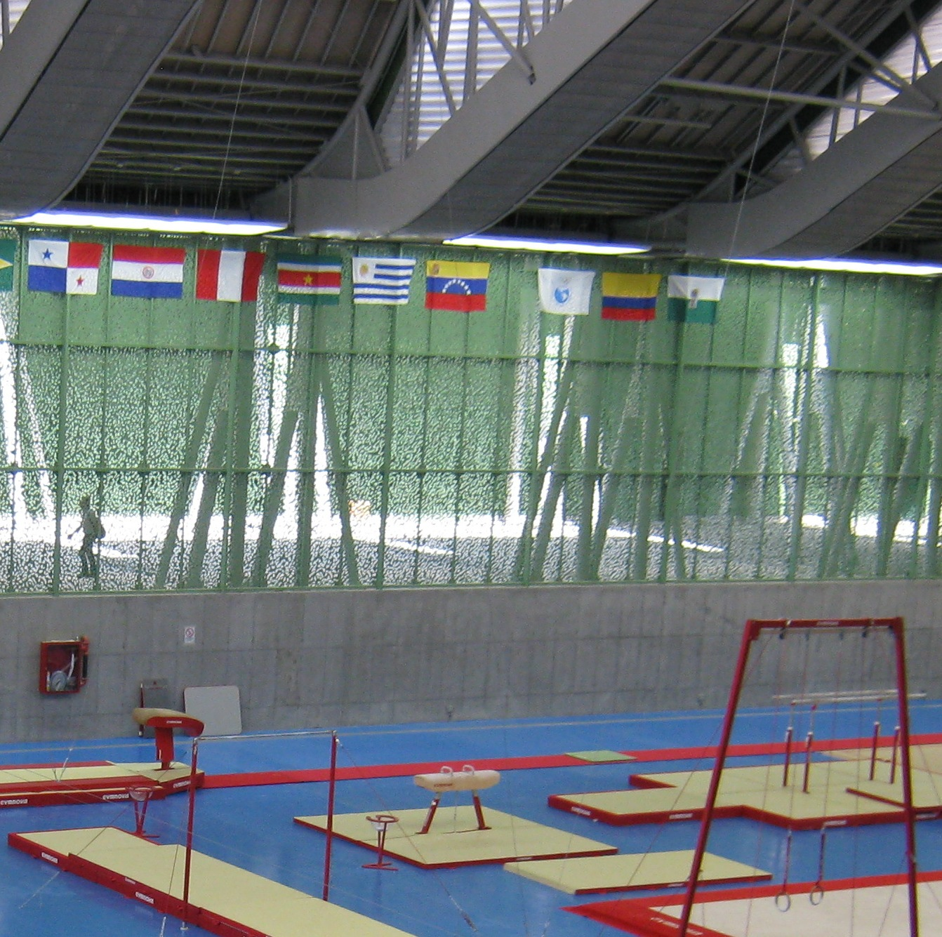 Interior del Coliseo de Gimnasia, en la Unidad Deportiva Atanasio Girardot. Medellín. Colombia.